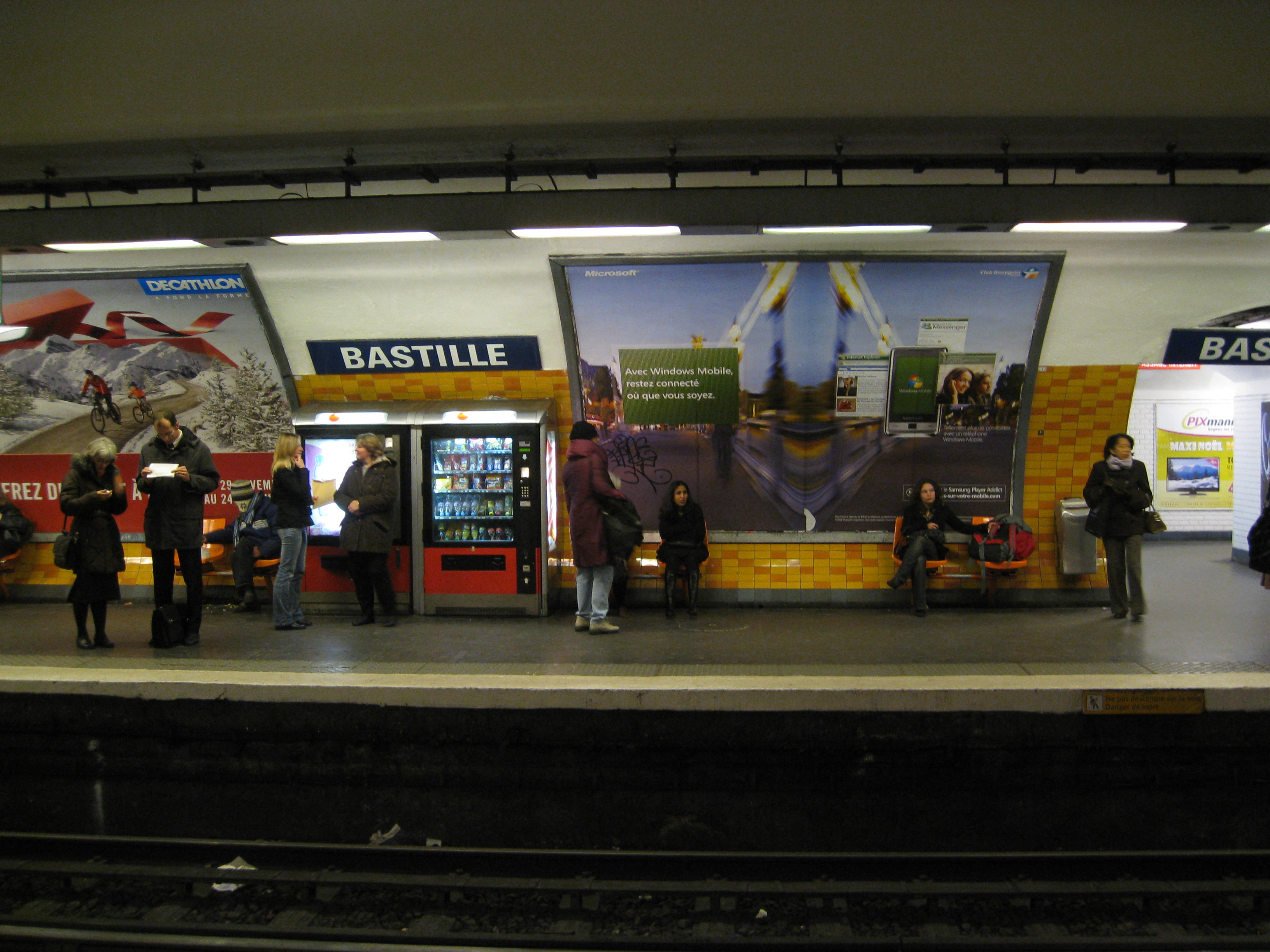 Station Bastille, ligne 5 du métro de Paris, France.